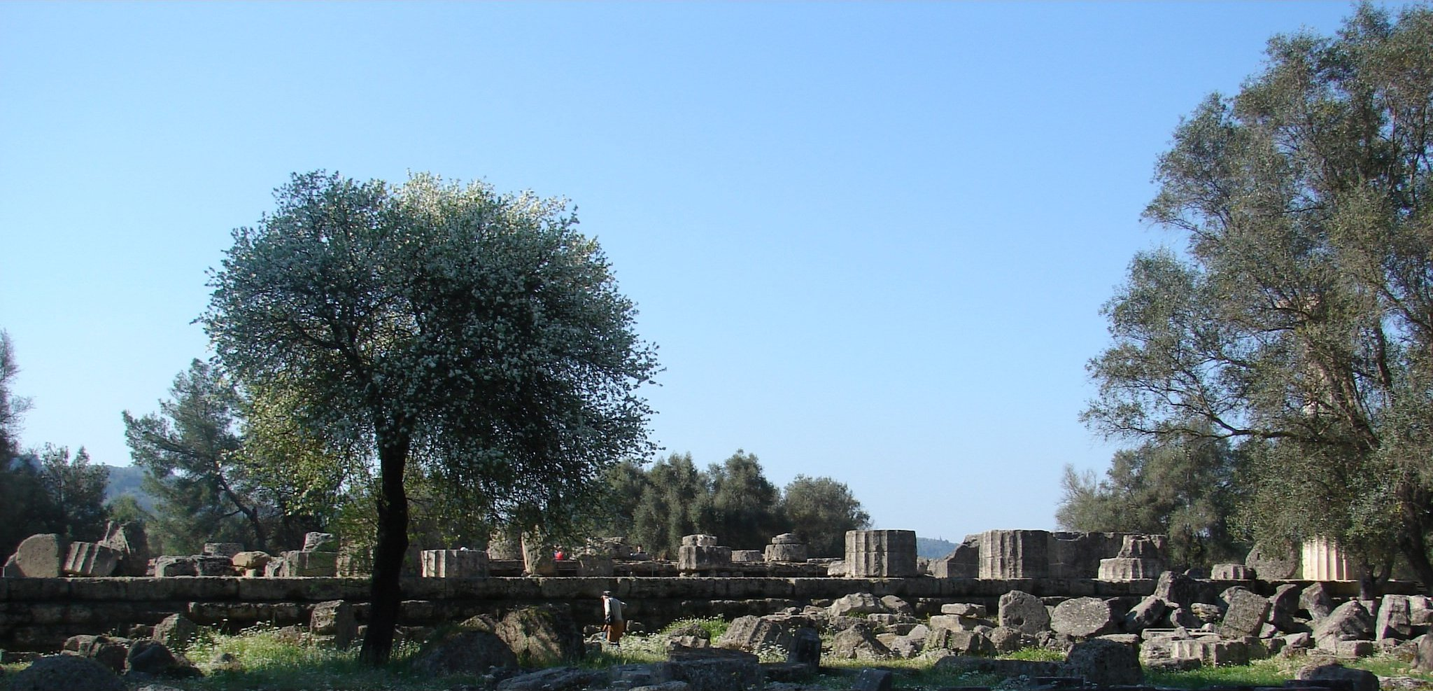 Tempio di Zeus ad Olimpia (Tutto)